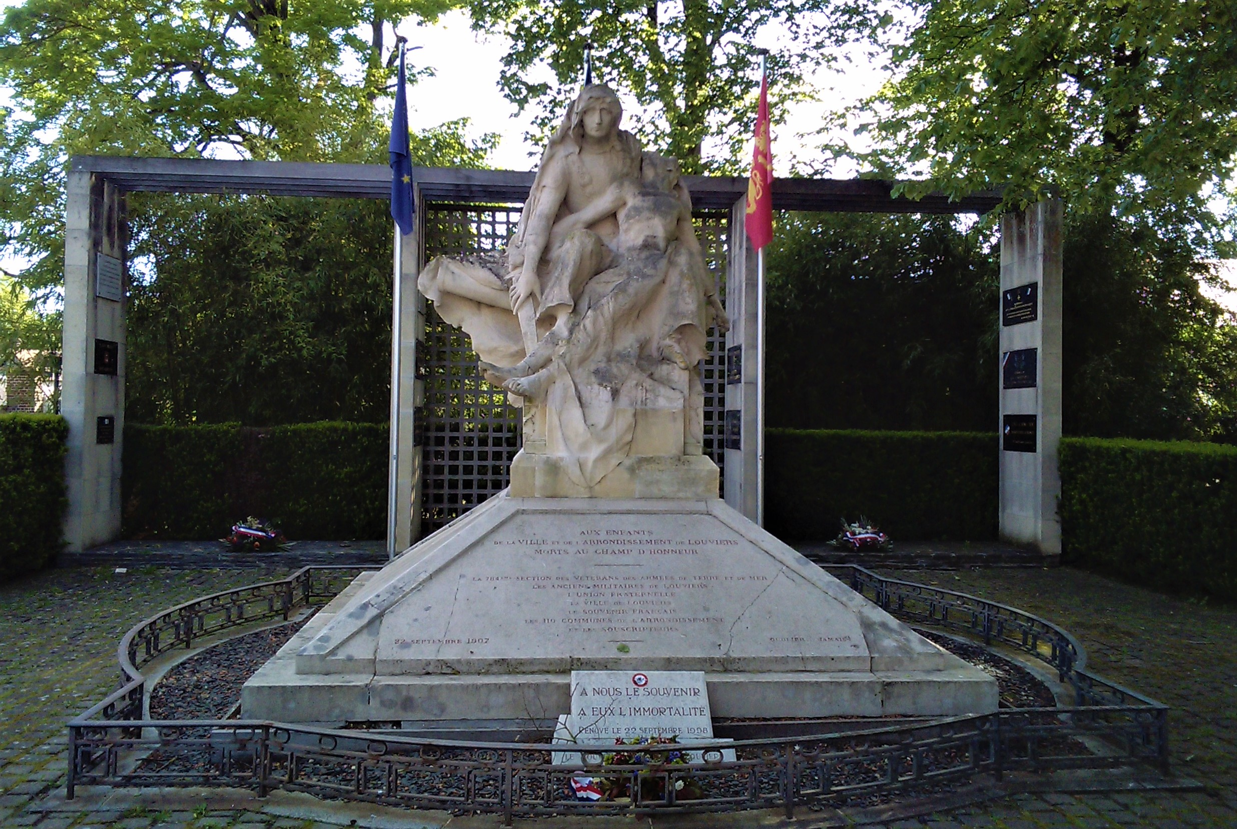 Louviers - Tour de ville du 16 mai 2019 - 2